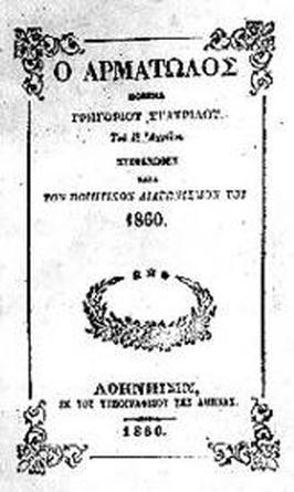 "Арматолос" на Григор Пърличев